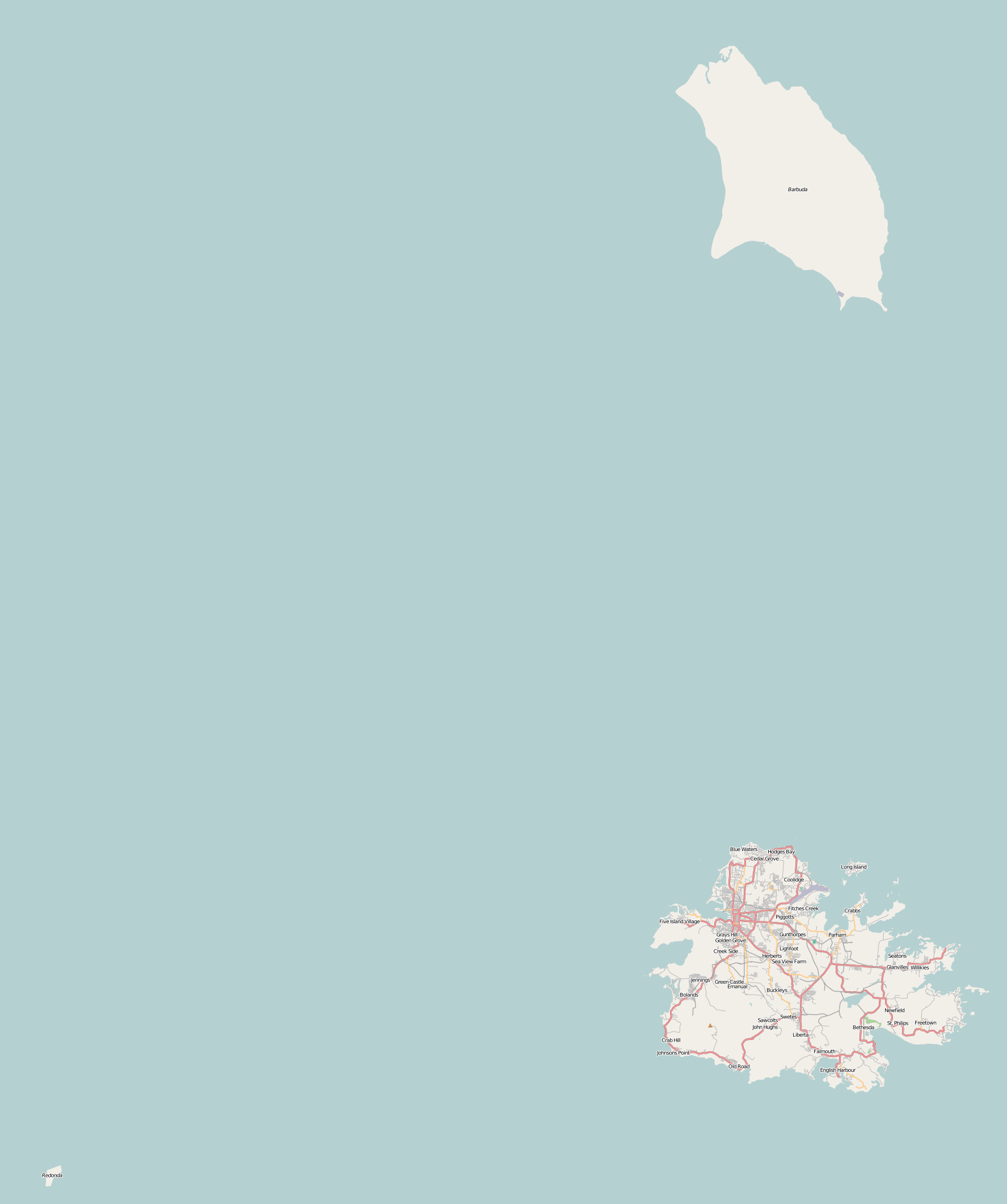 Antigua and Barbuda